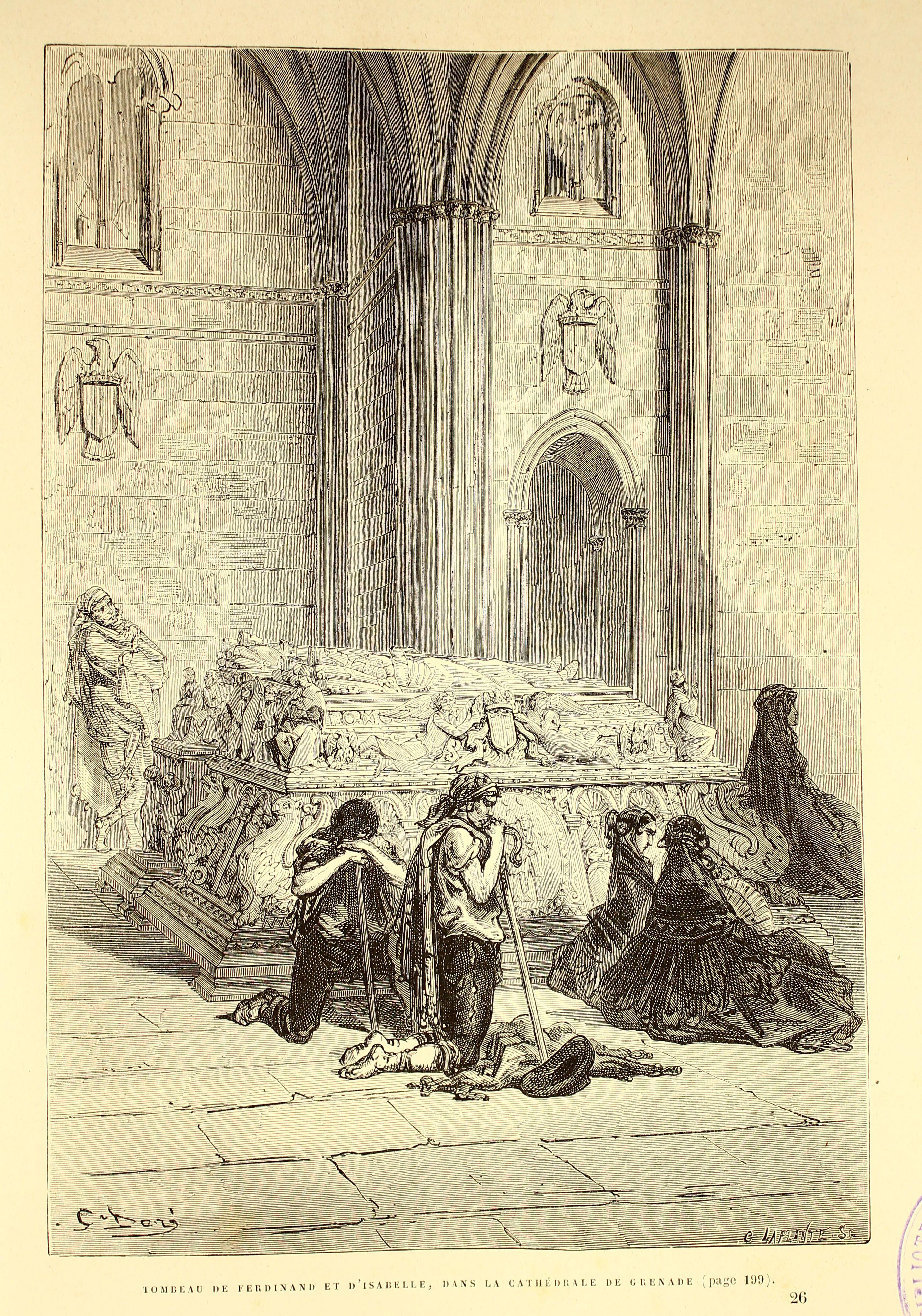 Autor: Davillier, Jean Charles, barón, 1823-1883 Descripción bibliográfica: L'Espagne / par Le Baron CH. Davillier ; ilustrée de 309 gravures dessinées su bois par Gustave Doré. - Paris : Librairie Hachette, 1874. - 799 p. : il. Materia: España- Geografía Materia: España- Usos y costumbres Ilustrador: Doré, Gustave, 1832-1883 Editor: Libreria Hachette Lugar de impresión: Francia, París Localización: Libro completo